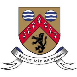 County Laois crest.Toponomastica: L'attuale nome Laois (da pronunciare nella nostra lingua lish) è il nome gaelico di quella che una volta era la Queen's county ("contea della regina"), e significa letteralmente "chiesa nei pressi della quercia". Da notare che anche le forme anglicizzate Laoighis e Leix sono corrette. Araldica civica Lo stemma del Laois è uno scudo dorato con un nastro contenente vari elementi distintivi. la V rossa capovolta (chevronels): rappresenta la catena montuosa delle Slieve Bloom Mountains e la Rock of Dunamaise, mentre i simboli bianchi in essa contenuti rappresentano le 7 tribù antiche locali principali. le due sfere ondulate (fountains): rappresentano i due fiumi principali della contea, il Nore e il Barrow e i due colori tradizionali e sportivi della contea (bianco-blu) il leone: l'animale su sfondo dorato era l'emblema degli antichi King of Laois, gli Ó Mordha. Il nastro invece riporta il motto in gaelico "L bÁirt leis an bpobal" che significa "Insieme con il Popolo". Bibliografia: Places names in Irish - International Civic Heraldry